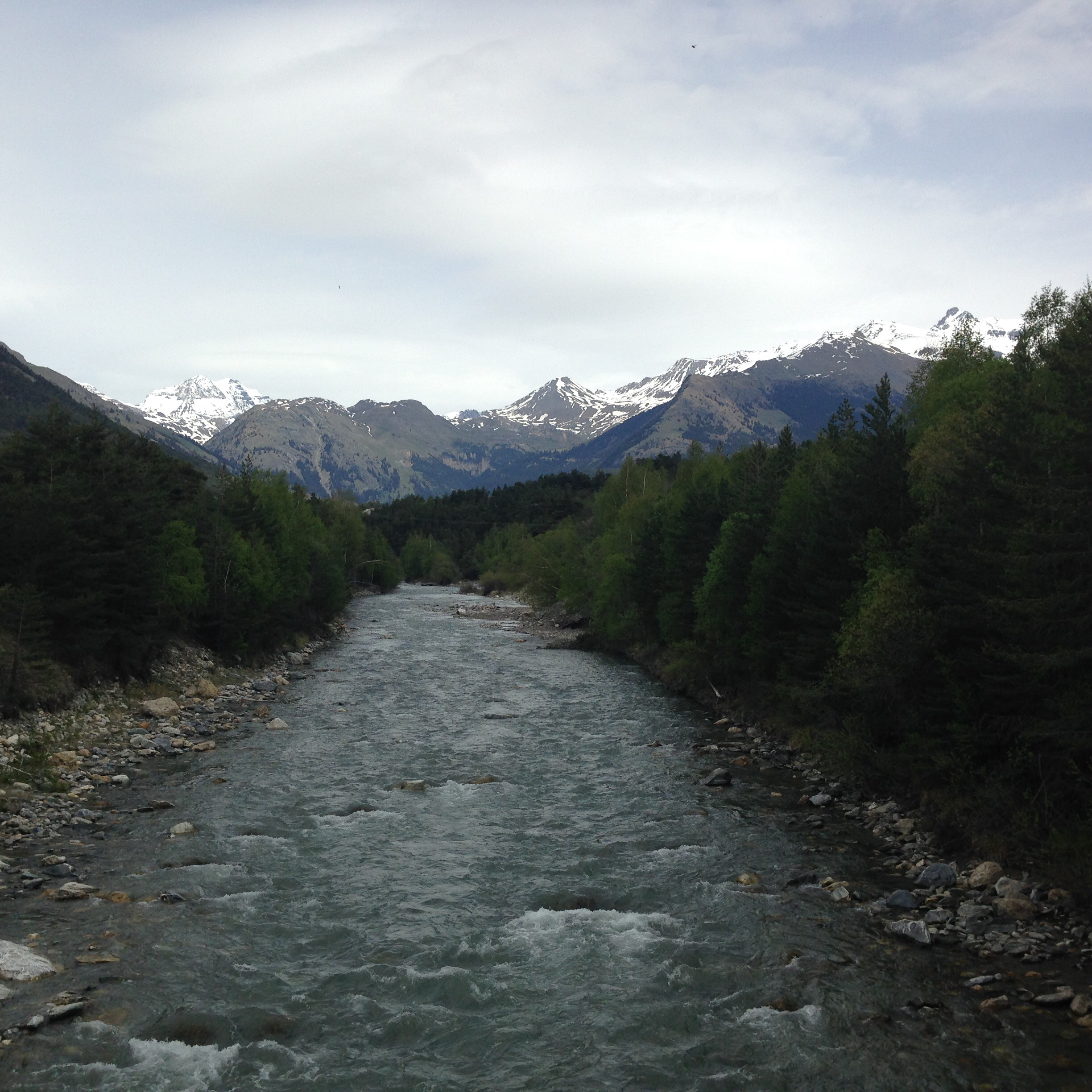 L'Arc, une rivière imprévisible aux crues dévastatrices